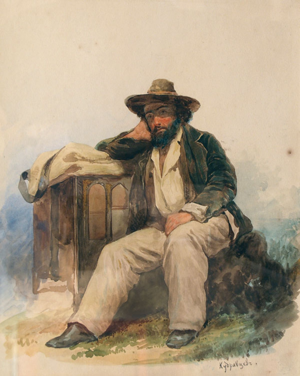 Картина "Портрет художника Алексея Александровича Писемского" - художник Михаил Андреевич Кудрявцев (1860-е). Бумага, акварель. 37,4х29,3см.